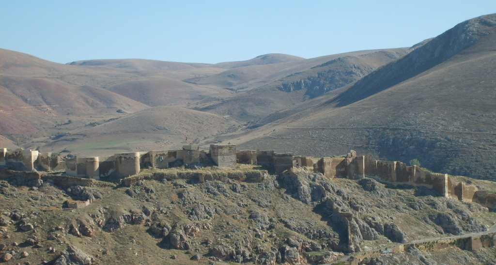 Bayburt kalesinden bir görüntü.